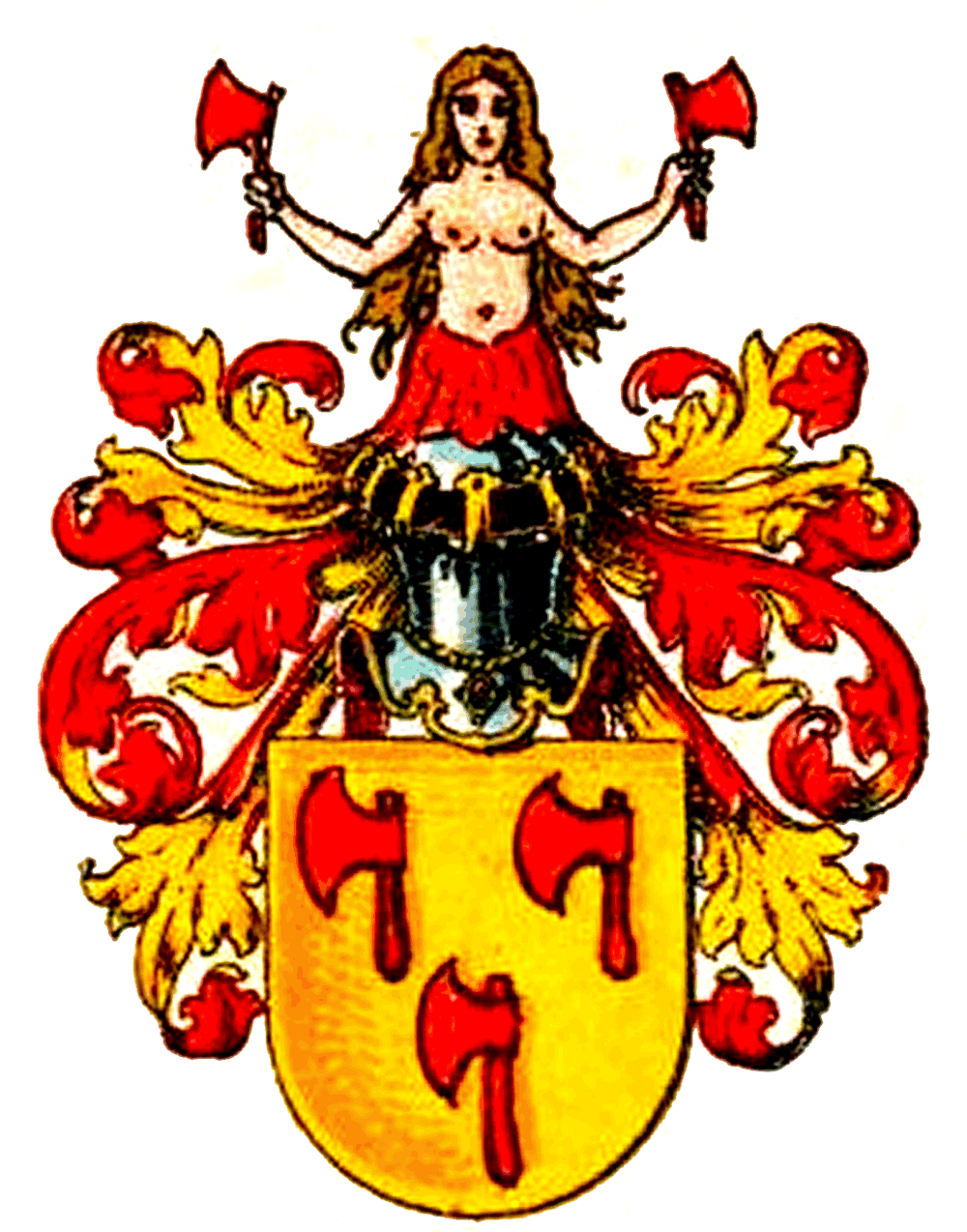 Stammwappen derer von Setten